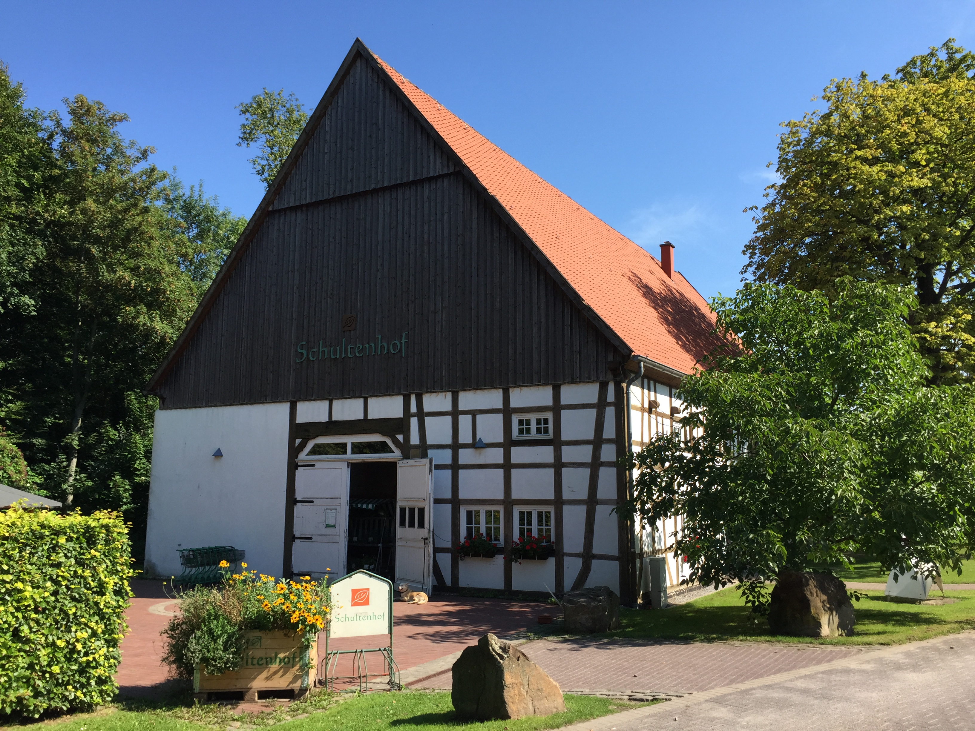 Schultenhof Dortmund-Barop HaupteingangThis is a photograph of an architectural monument., no. A 0053